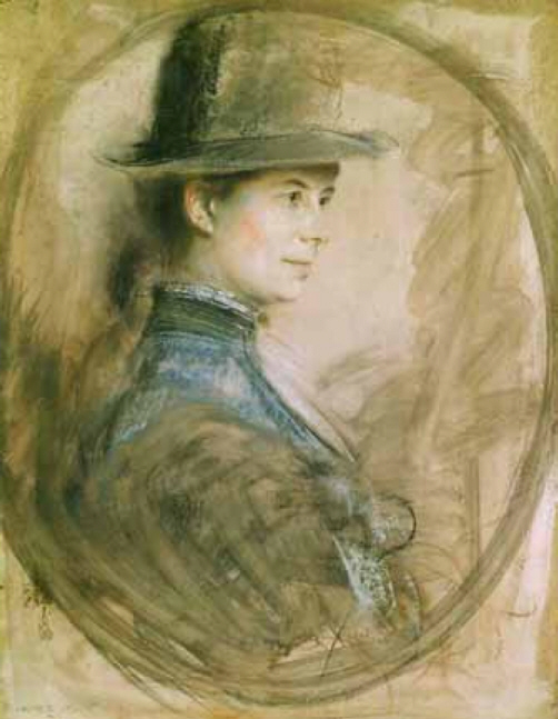 Bildnis Ellen Franz verh. Freifrau von Heldburg, um 1880, Pastell auf Karton, 74 x 59,5 cm Theaterwissenschaftliche Sammlung der Universität zu Köln, Schloss Wahn, Inv.Nr. 37032